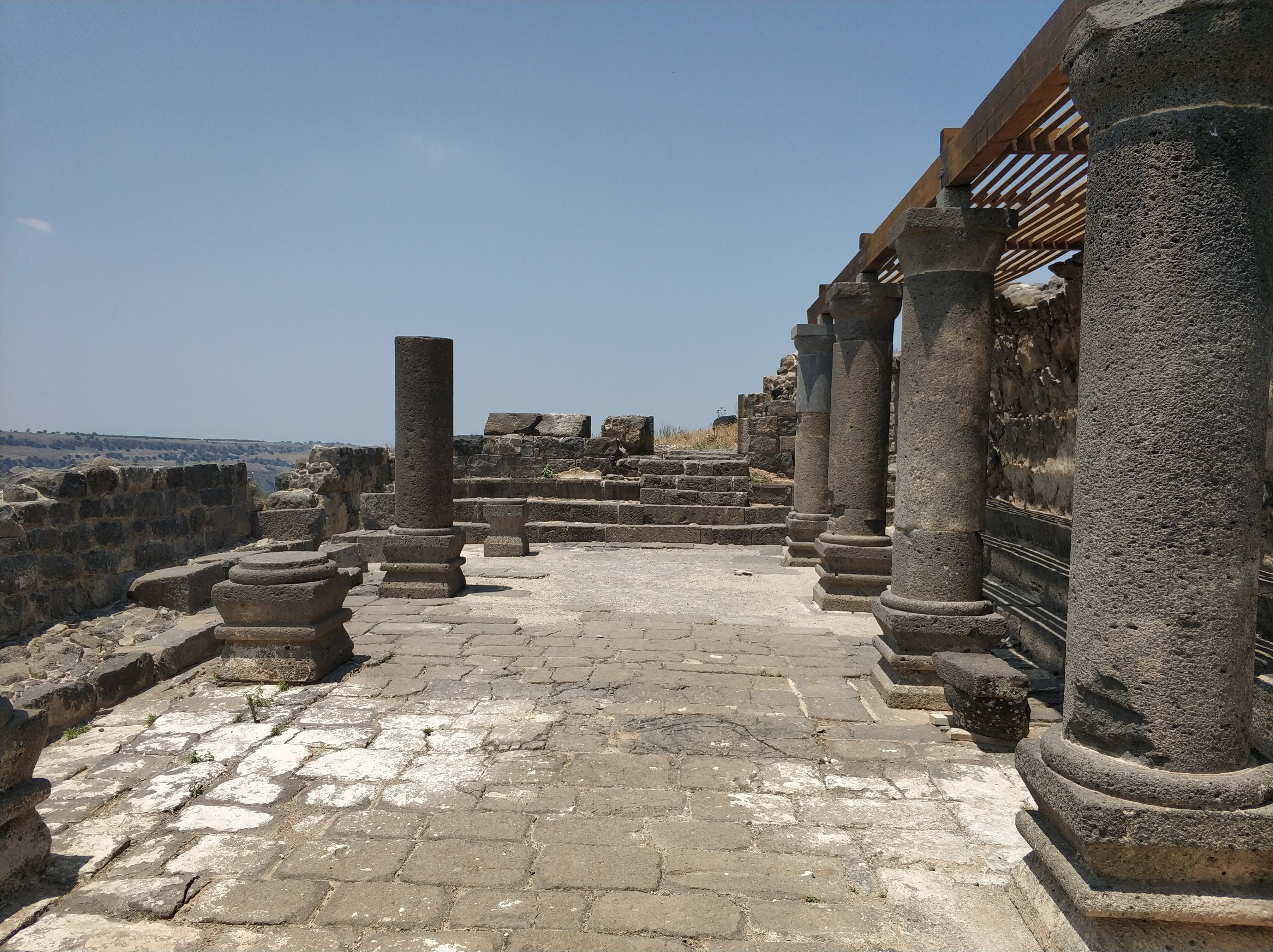 פנים בית הכנסת העתיק בדיר עזיז , יוני 2018